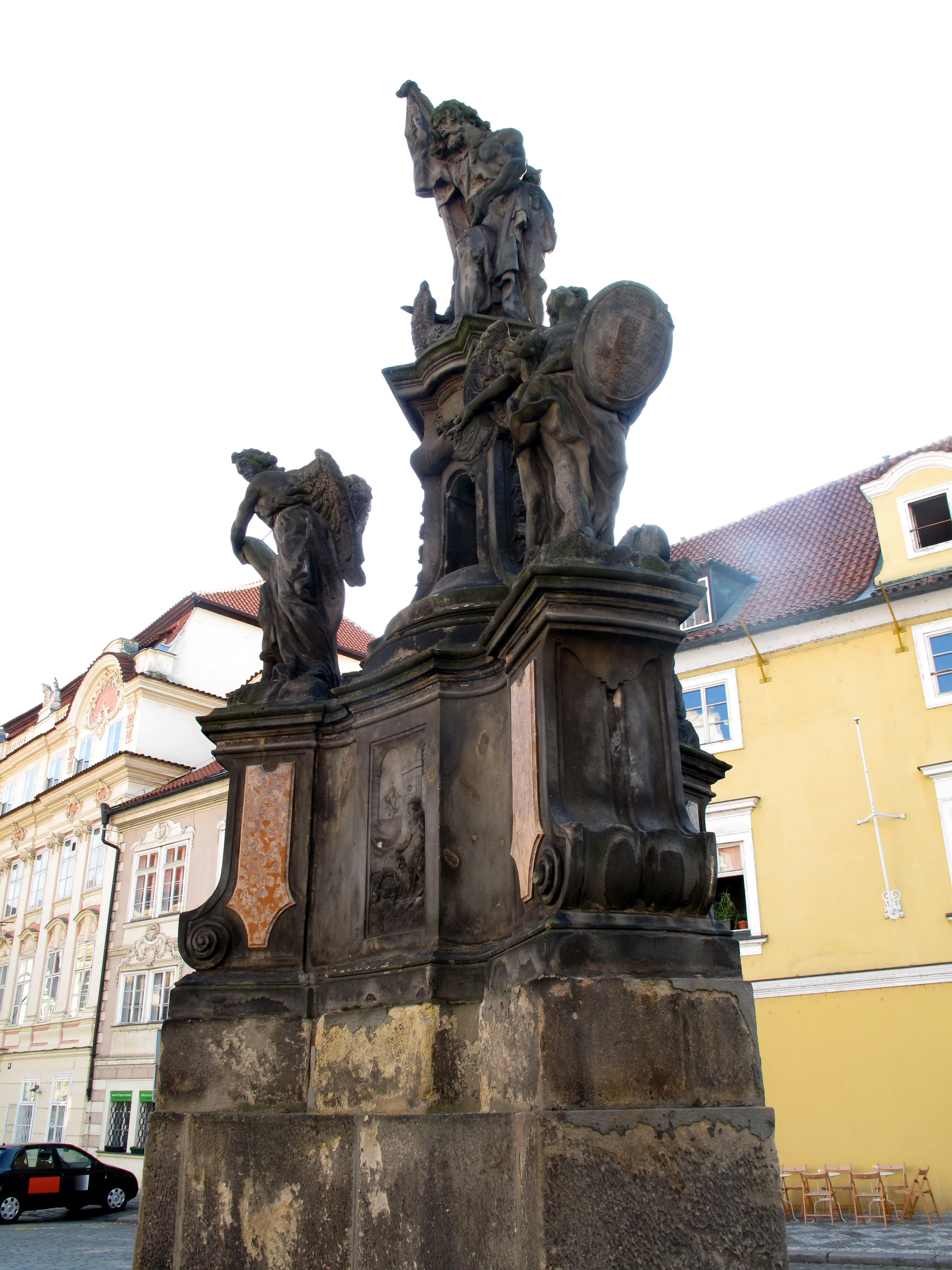 Česky: Praha-Malá Strana, Maltézské náměstí, sousoší sv. Jana Křitele s anděli od Ferdinanda Maxmiliána Brokoffa z roku 1715.